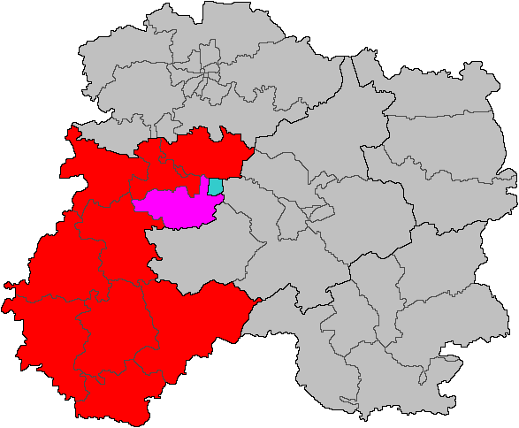 Carte de la commune de Plivot dans le canton d'Avize dans l'arrondissement d'Épernay dans le département de la Marne.